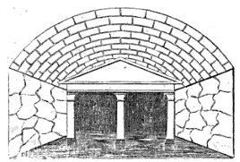 Skizze der P(e)irene-Quelle auf dem Akrokorinth von Karl Wilhelm Göttling (1793–1869)